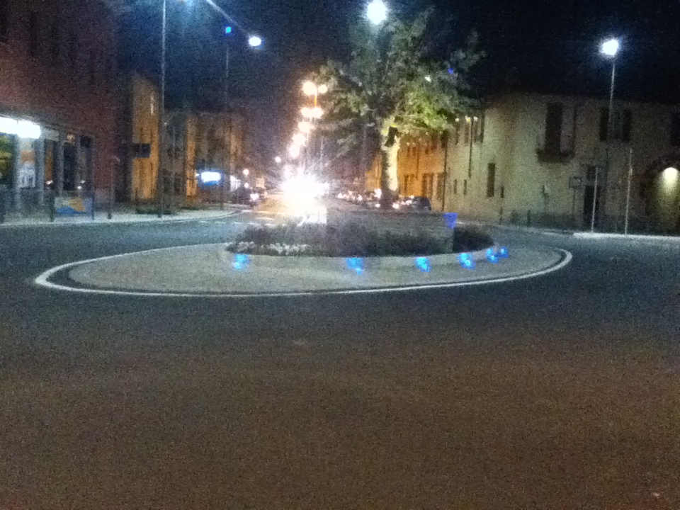 Fotografia della rotatoria ovale di Bollate Milanese